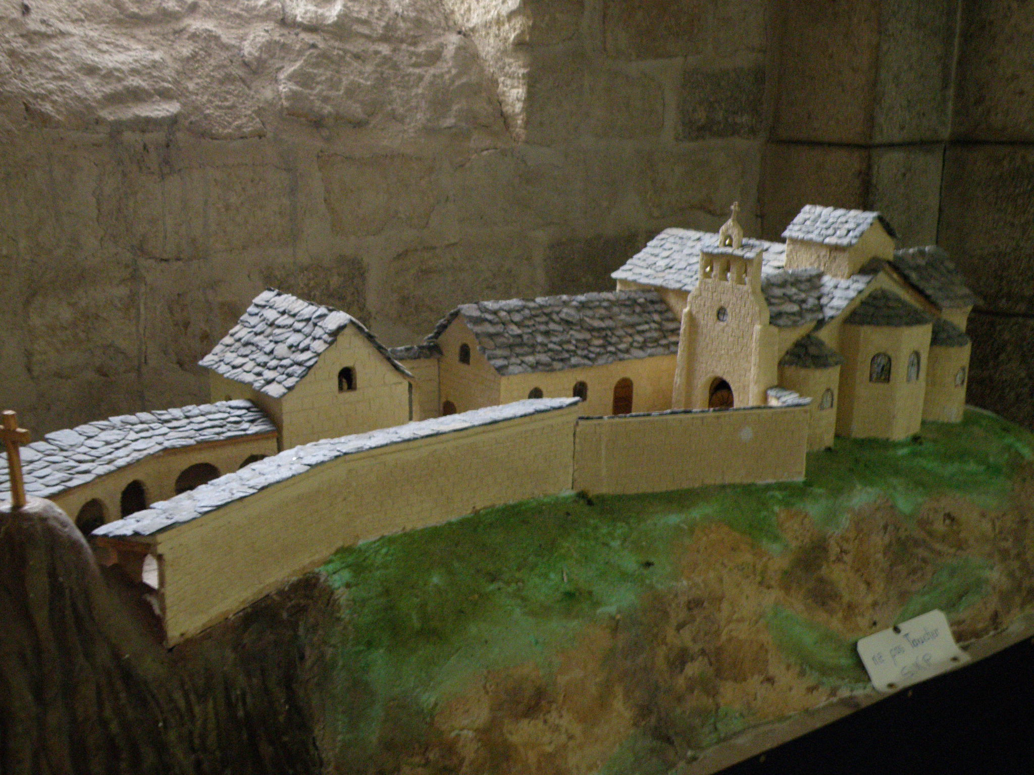 Saint-Julien-Chapteuil, comm. du dép. de la Haute-Loire, France (région Auvergne). Maquette de l'église Saint-Julien dans son état ancien. (Maquette exposée dans l'église.)